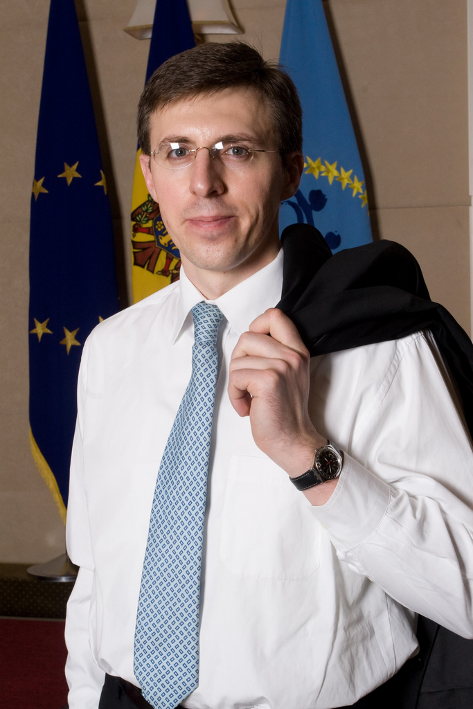 Dorin Chirtoaca (Alegeri 2009)